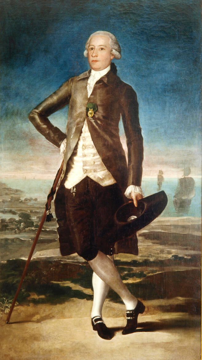 Retrato del político e ilustrado español Gaspar Melchor de Jovellanos (1744-1811).